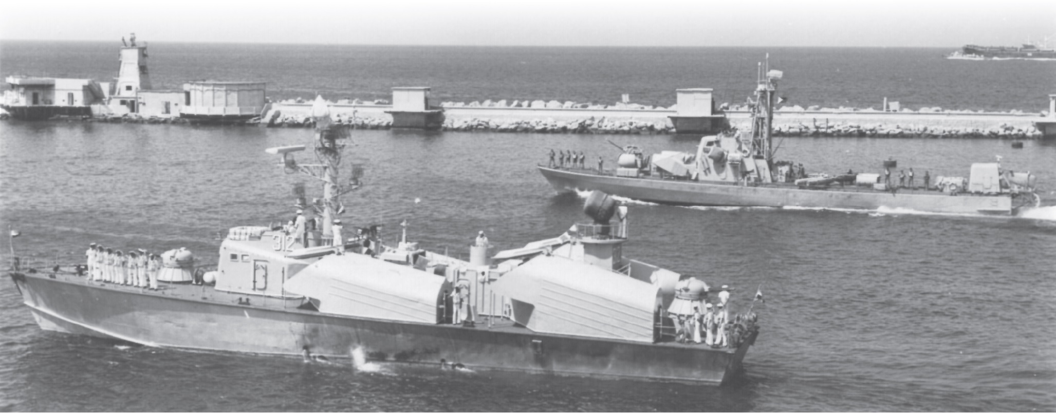 ספינת טילים מצרית מדגם אוסה מאבטחת את ביקור נשיא מצרים אנוואר סאדת בנמל חיפה ברקע ספינת טילים מדגם סער 2